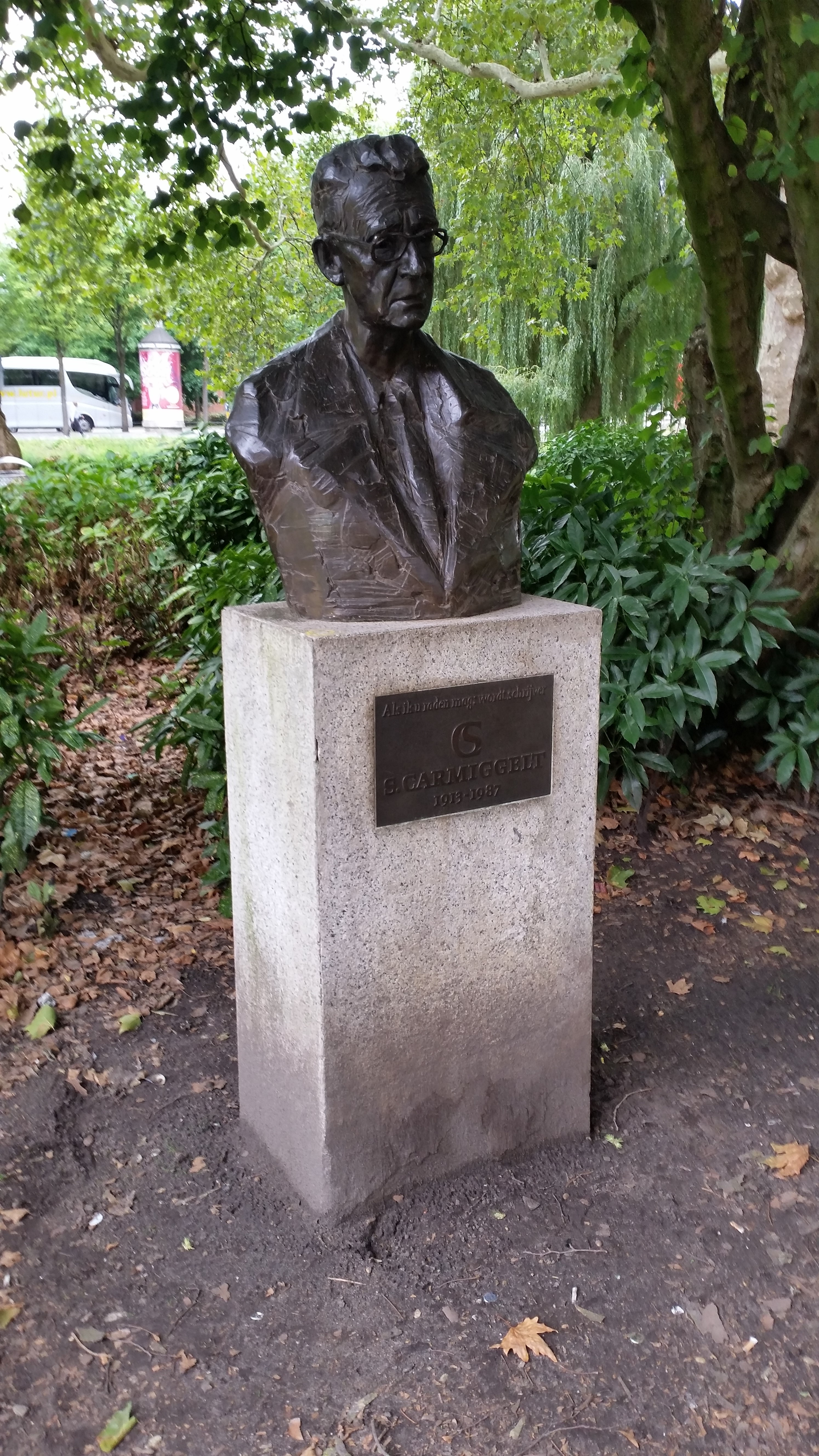 Buste Simon Carmiggelt in het Eerste Weteringplantsoen, Amsterdam-Centrum; ontwerp van Kees Verkade; letters op de plaquette van Helmut Salden